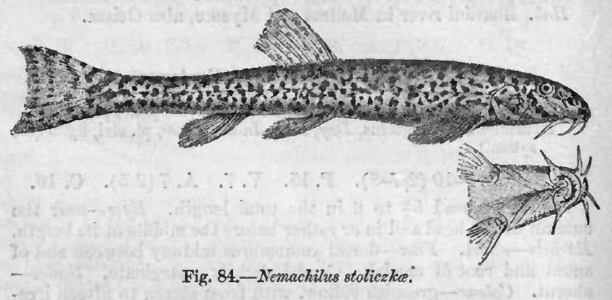 Nemacheilus stoliczkai = Triplophysa stoliczkai (Steindachner, 1866)